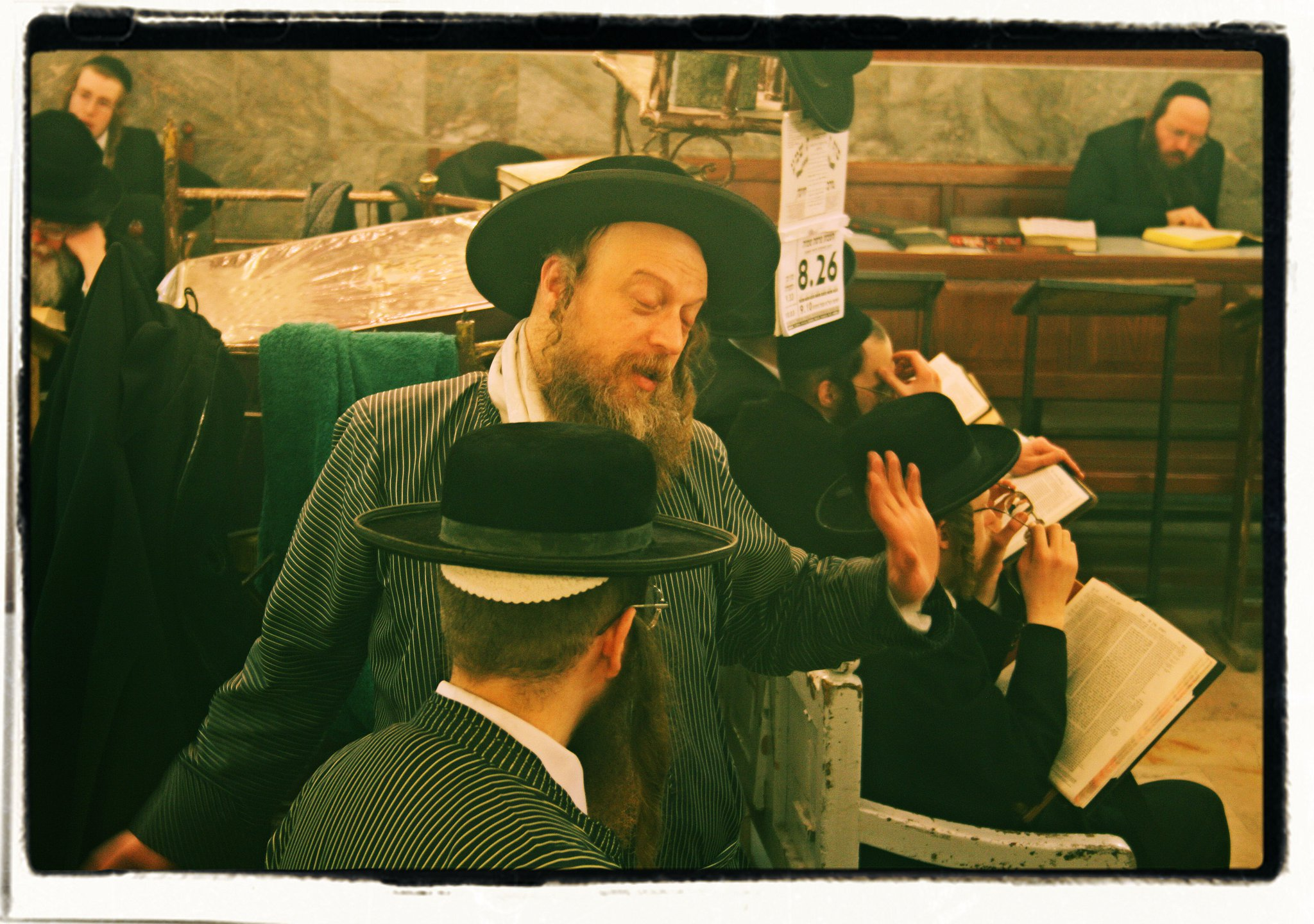 יוסף יואל קאהן